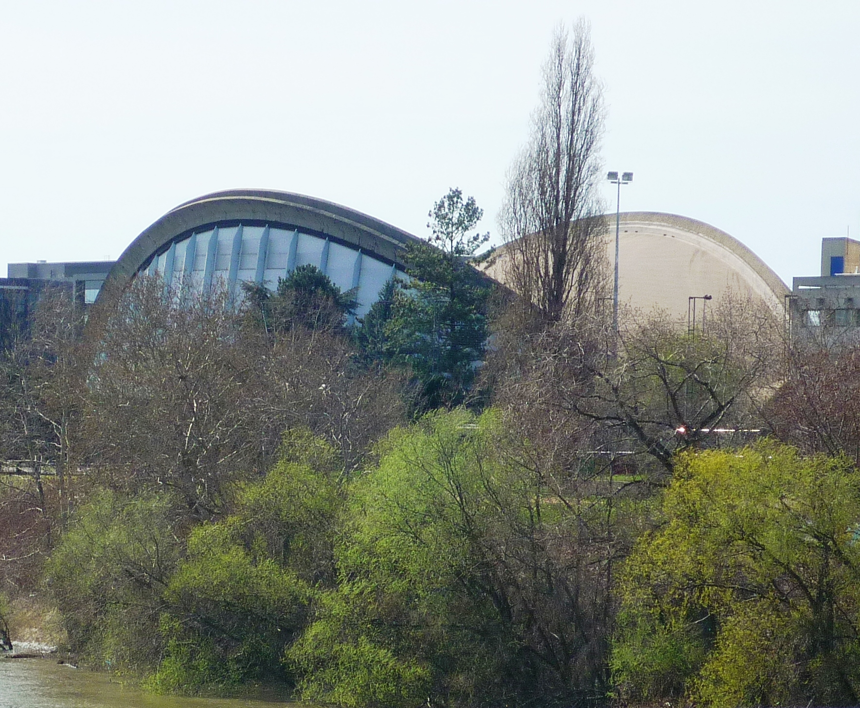 centre sportif et culturel, sur la pointe Île-des-Vannes de l'île Saint-Denis